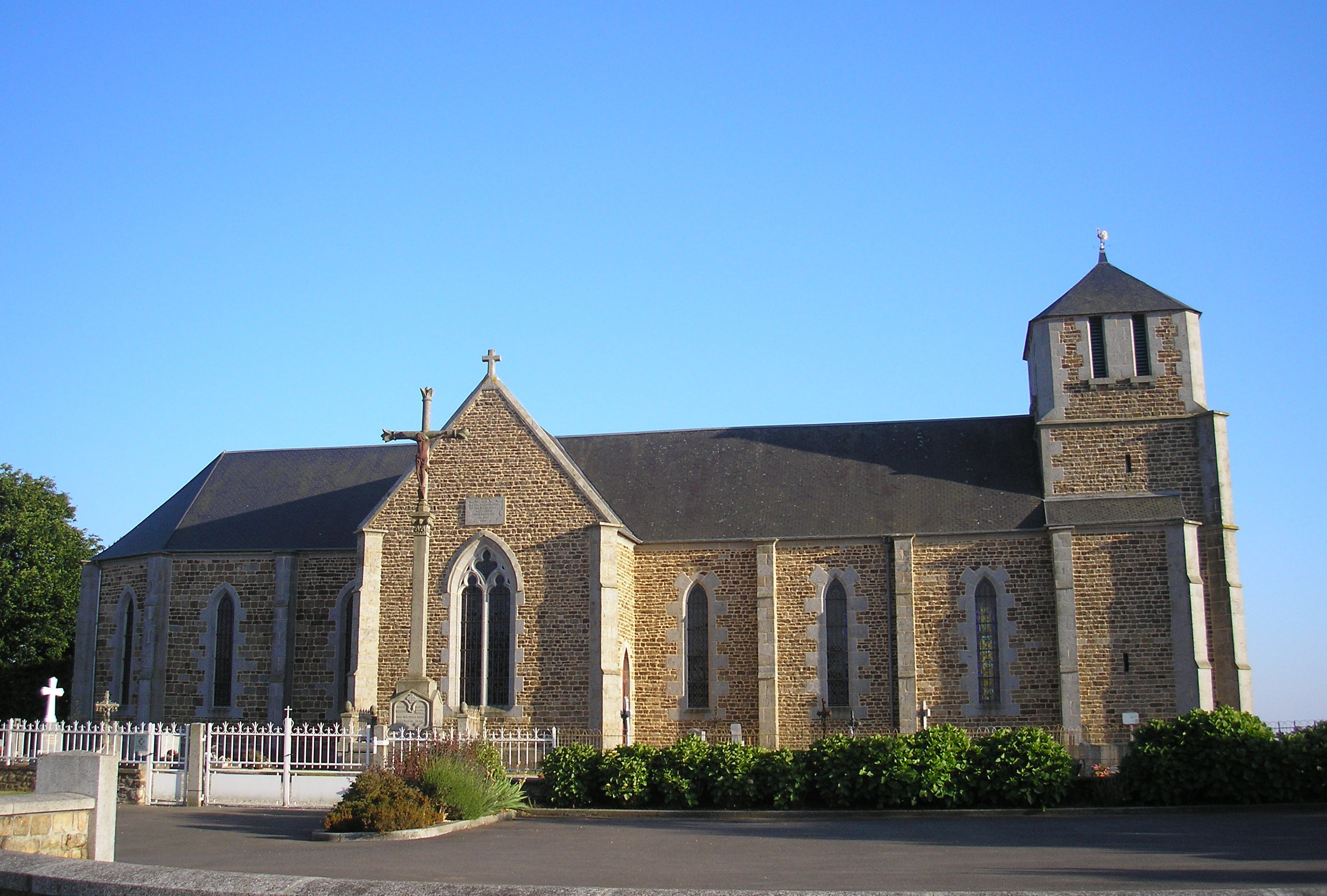 Le Mesnil-Ozenne (Normandie, France). L'église Saint-Martin.